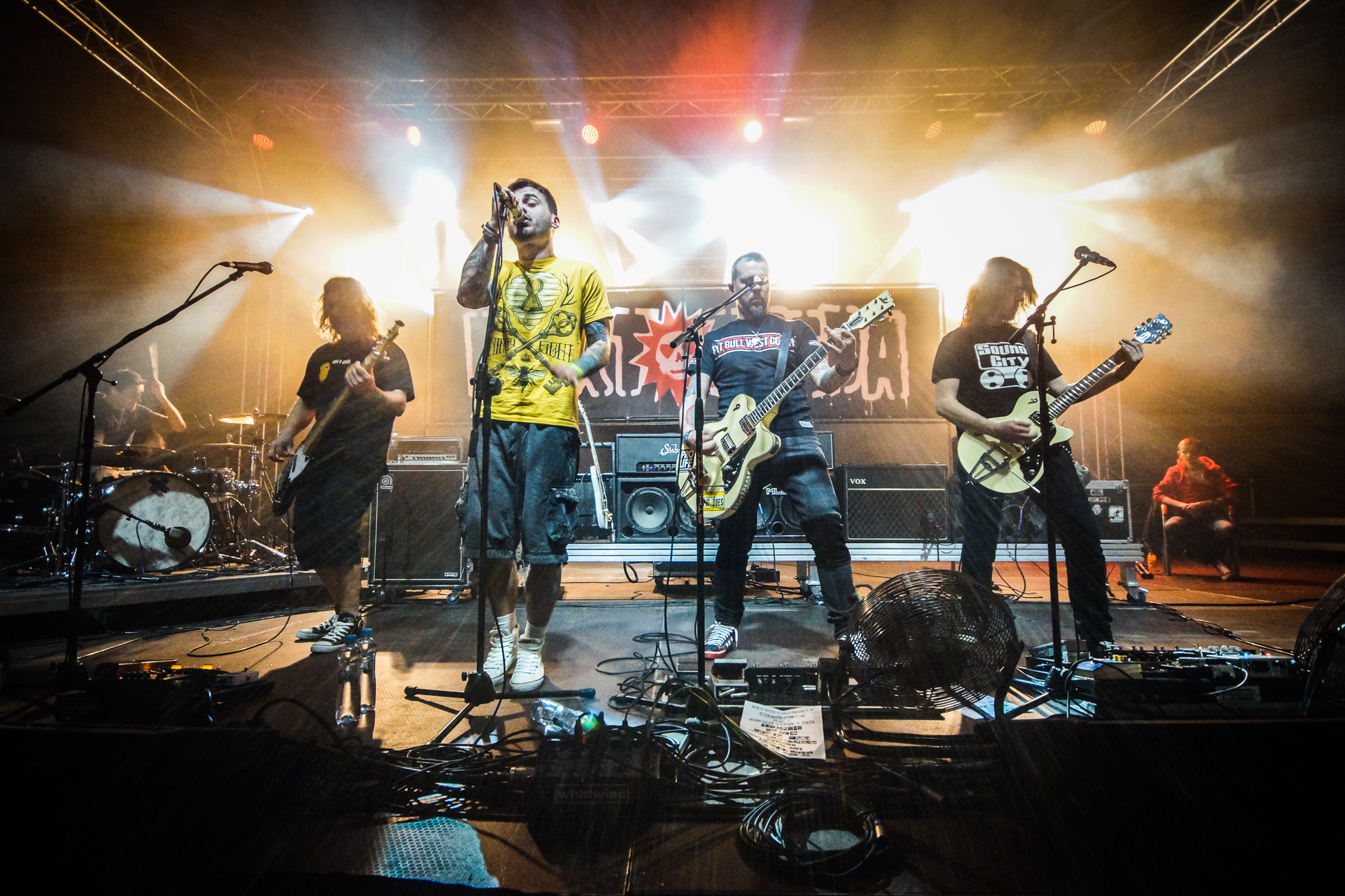 Zespół Luxtorpeda podczas Rocket Festiwal 2014 w Warszawie.